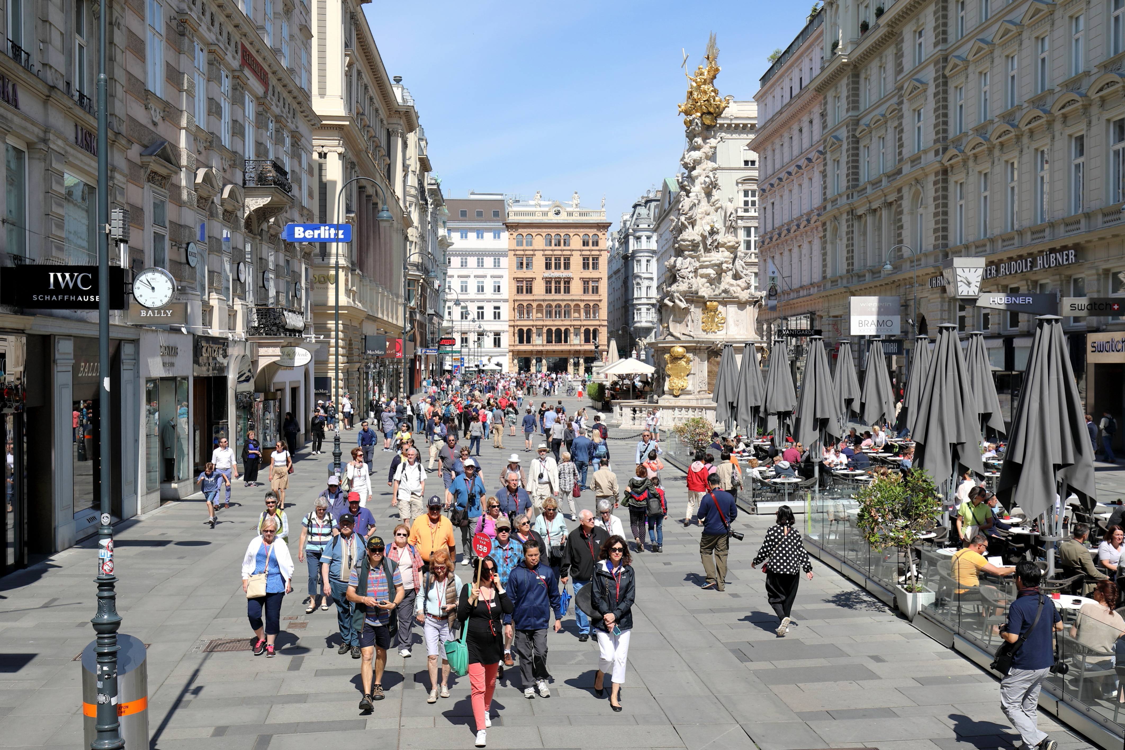 Die Prachtstrasse und jetzige Fußgängerzone Graben im 1. Wiener Gemeindebezirk Innere Stadt mit der 1679 gestifteten Dreifaltigkeitssäule (Pestsäule) im Zentrum. Der Graben wird 1294 erstmals urkundlich als Verkehrsfläche erwähnt und 1300 erstmals als Marktplatz bezeichnet. 1971 wurde erstmals in Wien an dem rund 250 Meter langen Straßenzug probeweise die Fußgängerzone eingeführt.